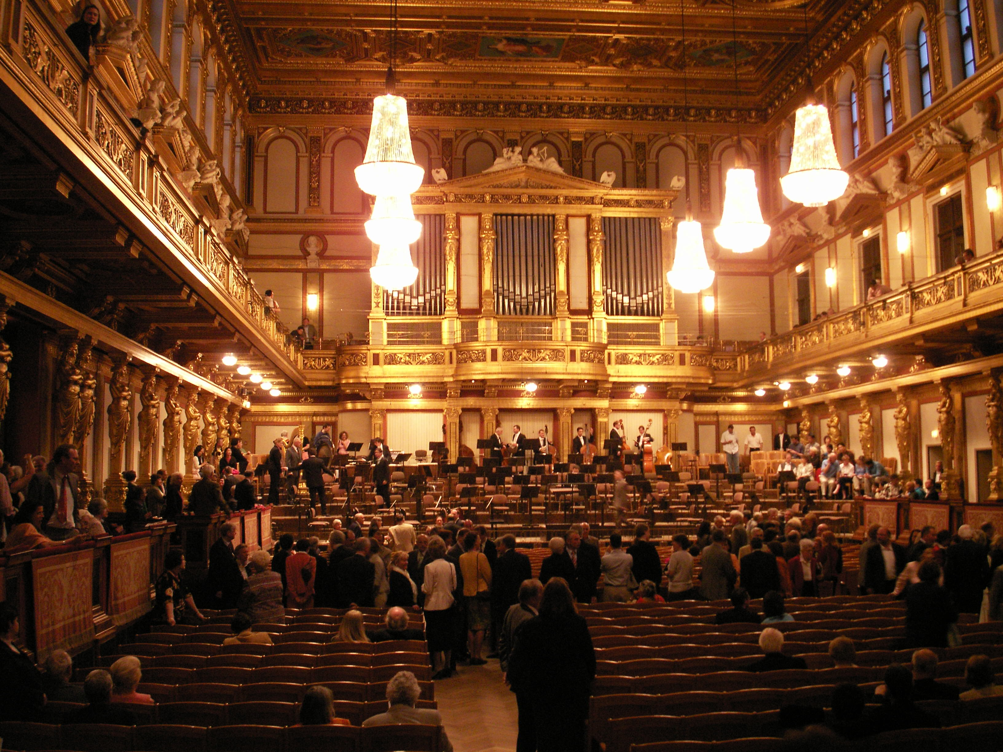 Musikverein Wien, Großer Saal